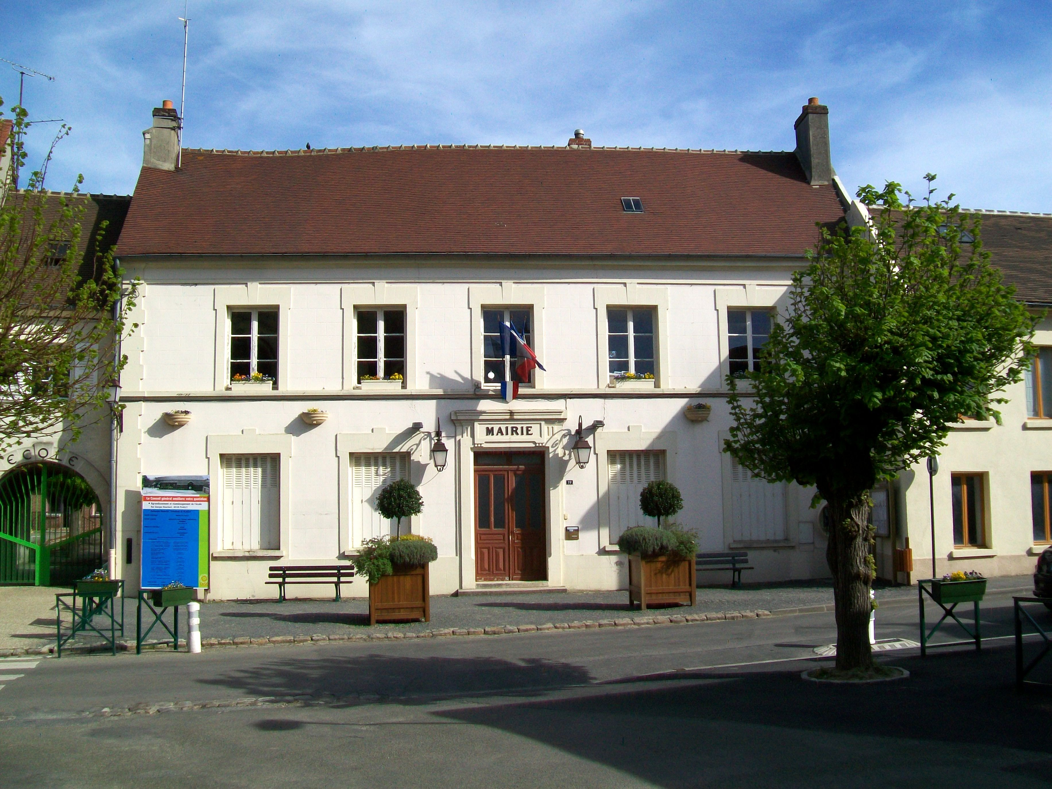 La mairie de Plailly jusqu'en 2013, rue de la Mairie, à côté de l'église.